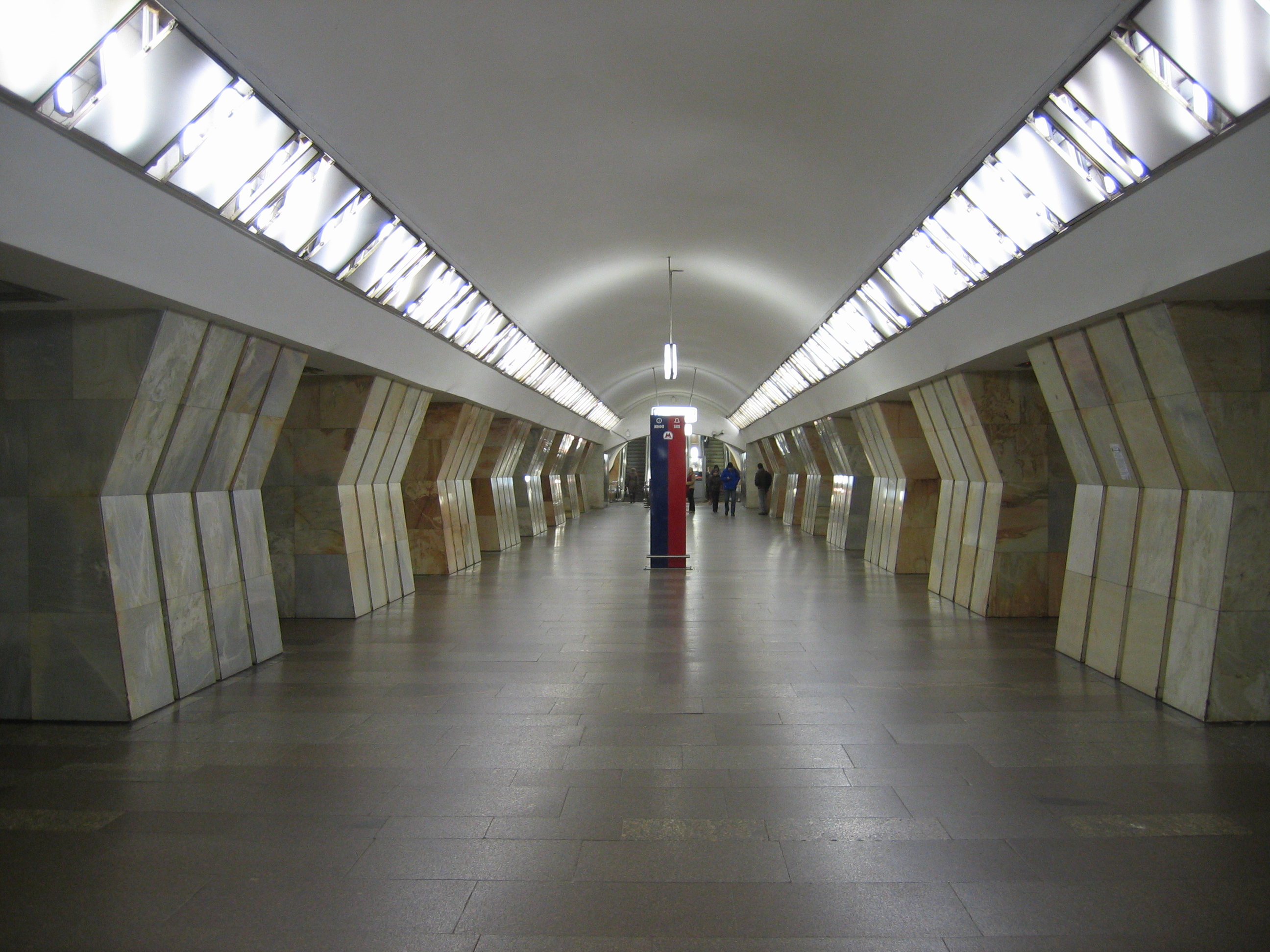 Station Sucharewskaja der Metro Moskau